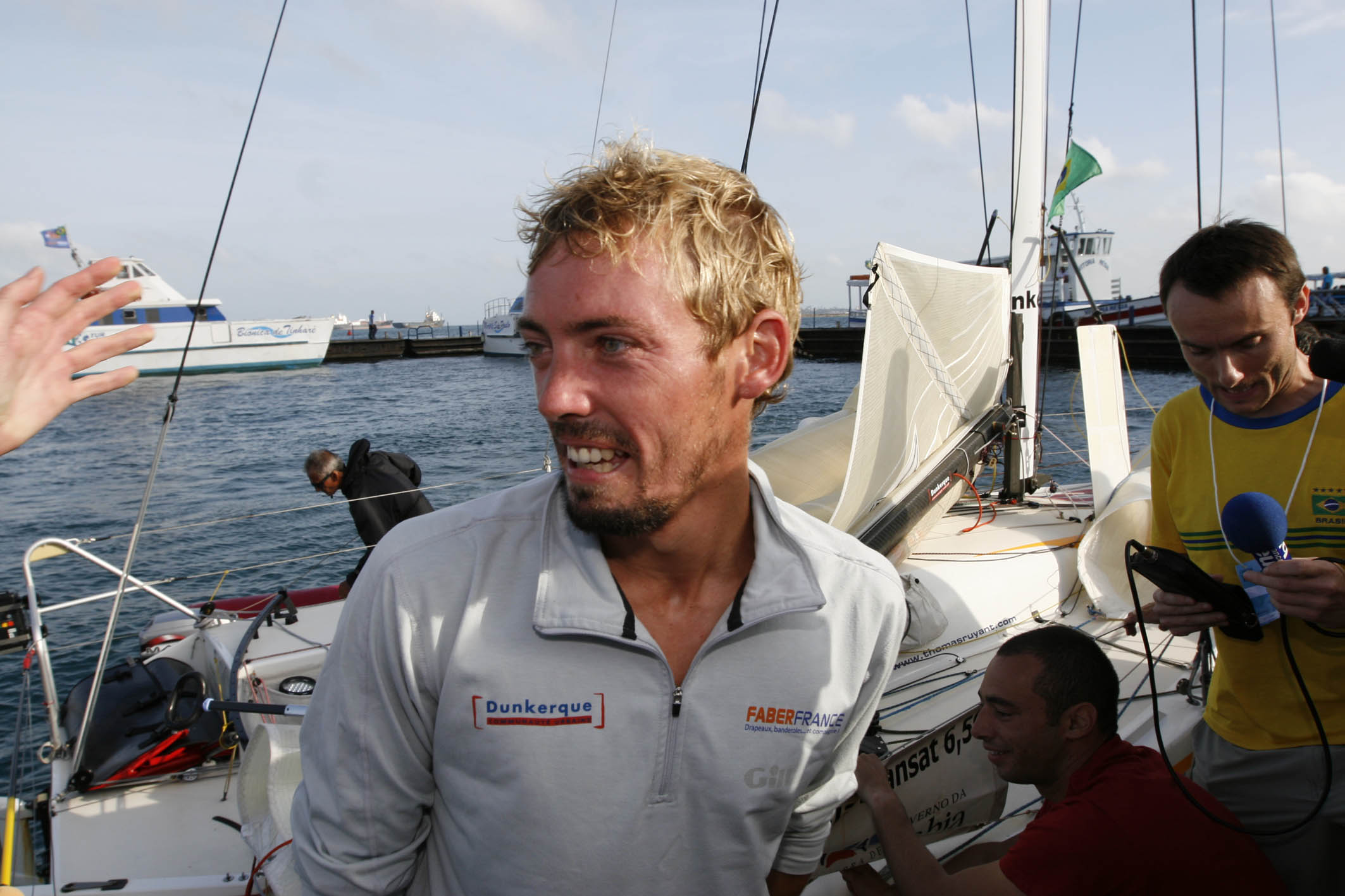 No Terminal Náutico da Bahia, administrado pela Superintendência dos Desportos do Estado da Bahia (Sudesb), o velejador da cidade de Dunkerque, de 29 anos, disse que a travessia foi muito emocionante, mas muito difícil. Foto: Arisson Marinho / AGECOM